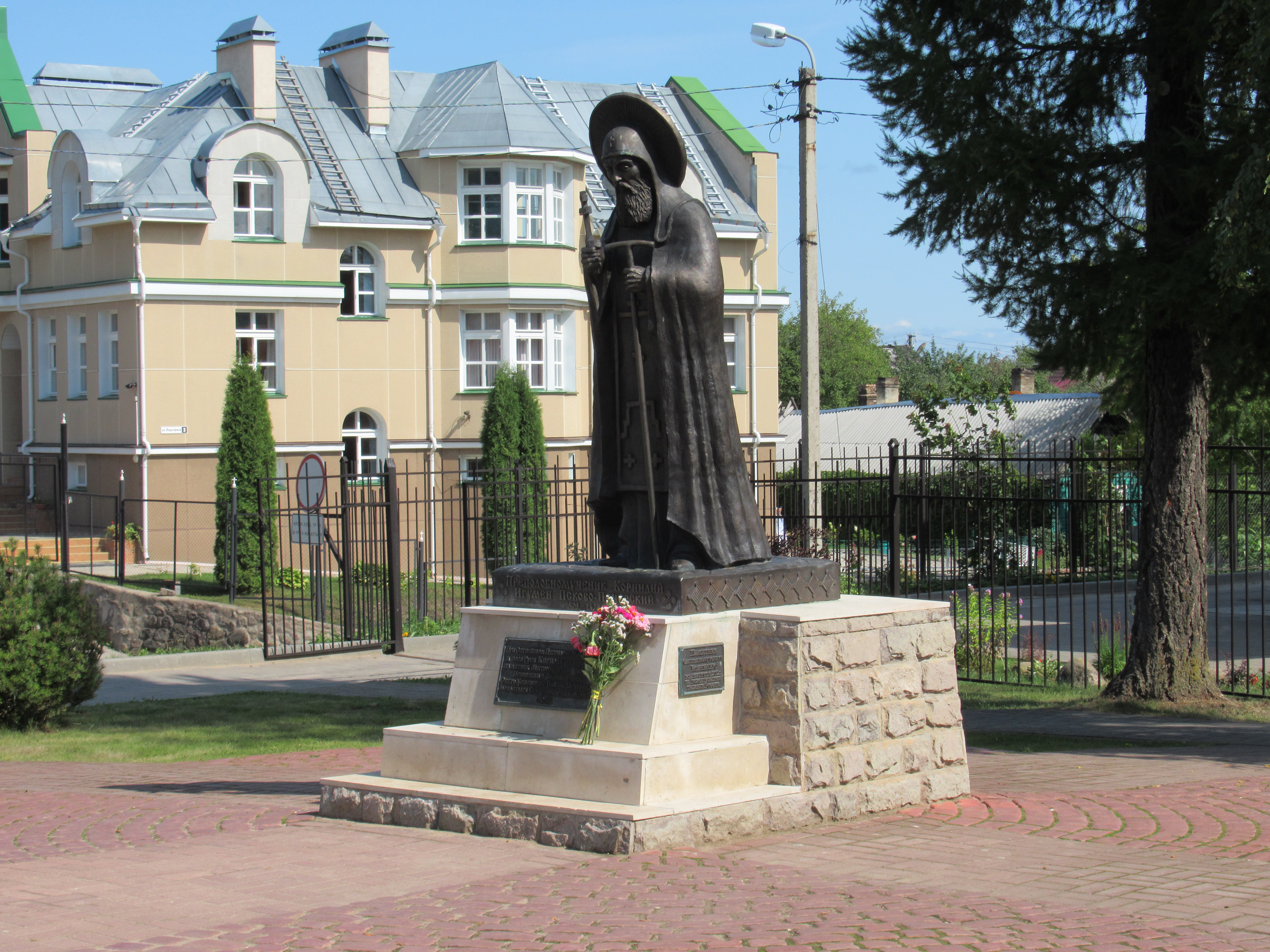 Kornelius Petserist, asub Petseris